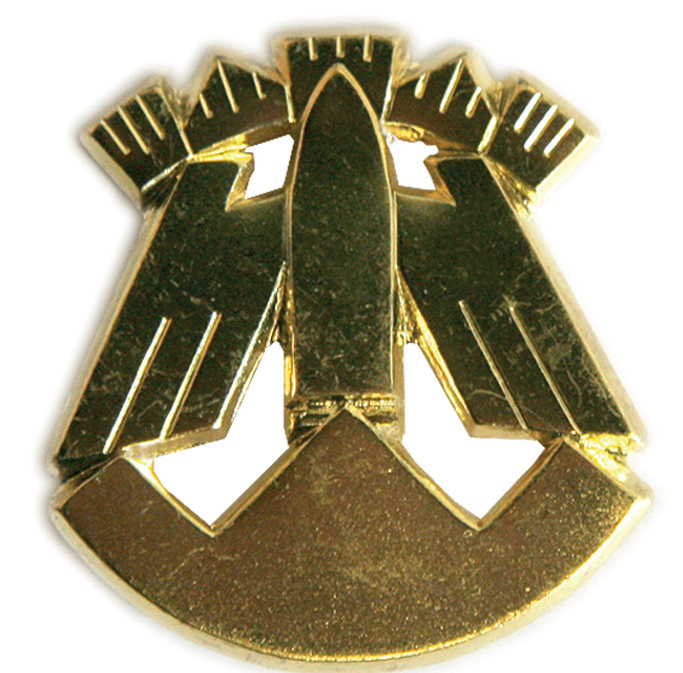 Itsenäisyyspäivänä 1974 patteriston nimi muutettiin Rovaniemen Ilmatorjuntapatteristoksi. Samalla vahvistettiin uusi joukko-osastotunnus. Pohjanmaan näätä vaihtui Rovaniemen kaupunkivaakunan revontuli- ja tunturikuvioon.